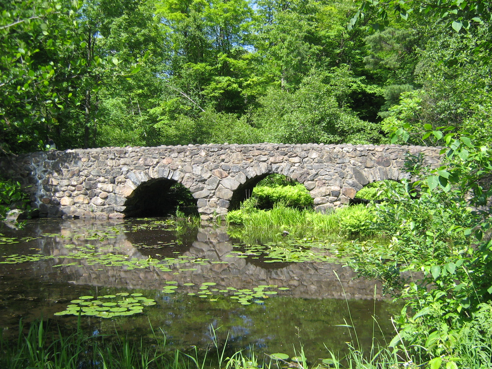 Pont de pierre construit par Edson Loy Pease dans le parc national du Mont-Saint-Bruno